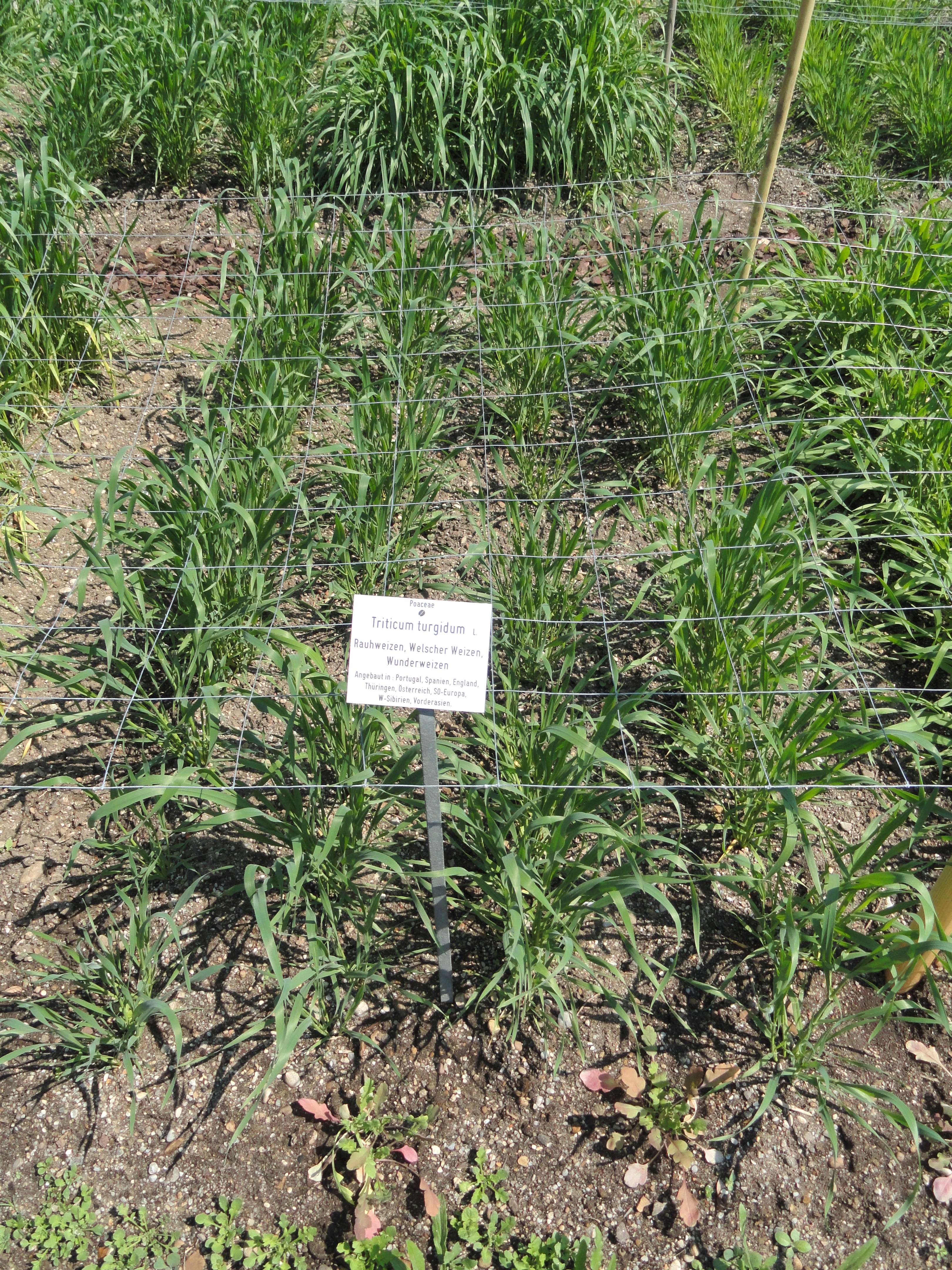 Triticum turgidum specimen in the Botanischer Garten München-Nymphenburg, Munich, Germany.